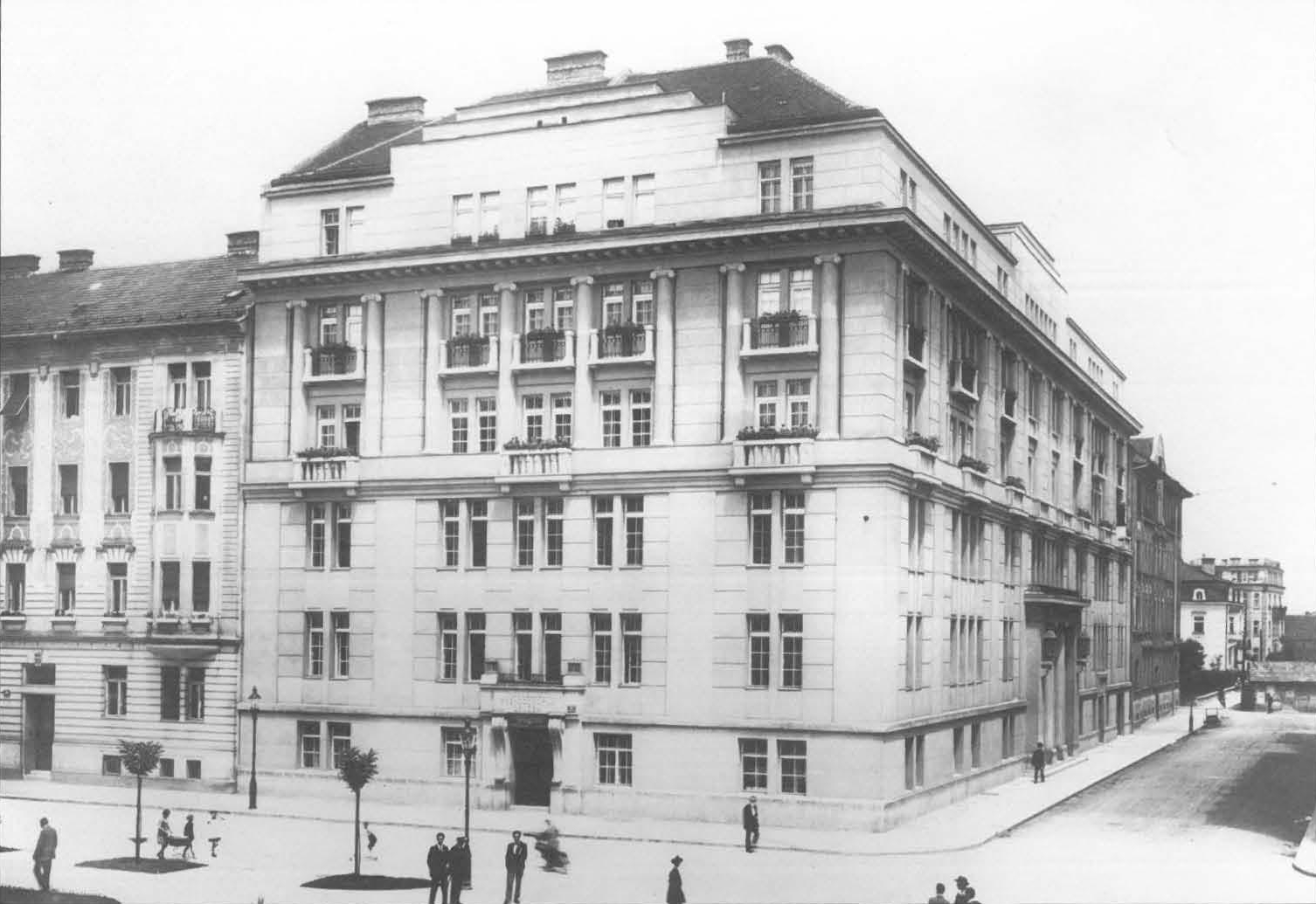 Palača Trboveljske premogokopne družbe (1925; zdaj Cankarjeva 14 / Župančičeva 3).